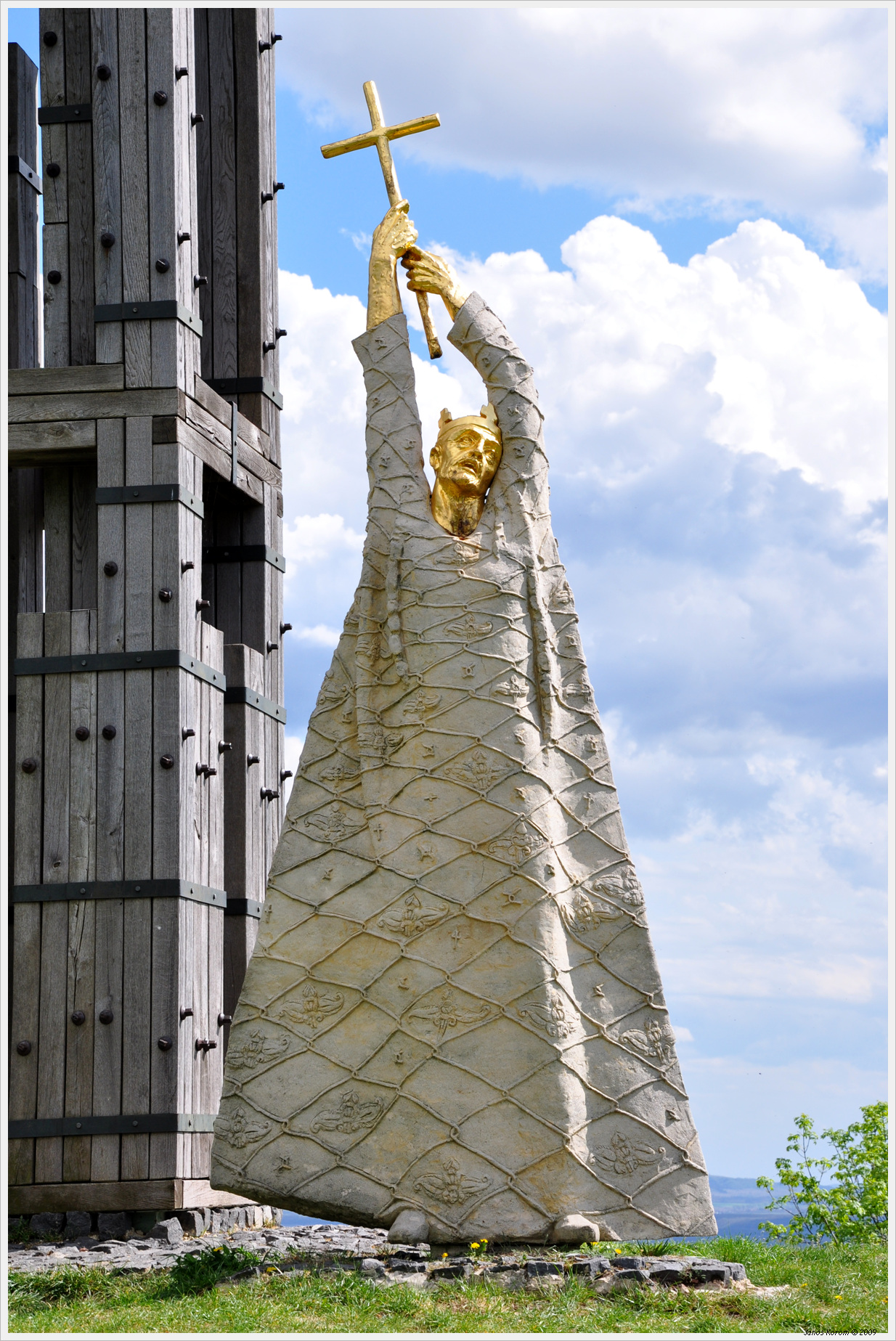 Szent István emlékmű - Szent István szobor (Kiss Sándor, Vadász György (építész), Czér Péter (építész), Kiss Ervin (tervező) 1998.).[1] - Doba, Somló-hegy hegytető